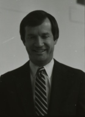 Peter Roussel in 1982